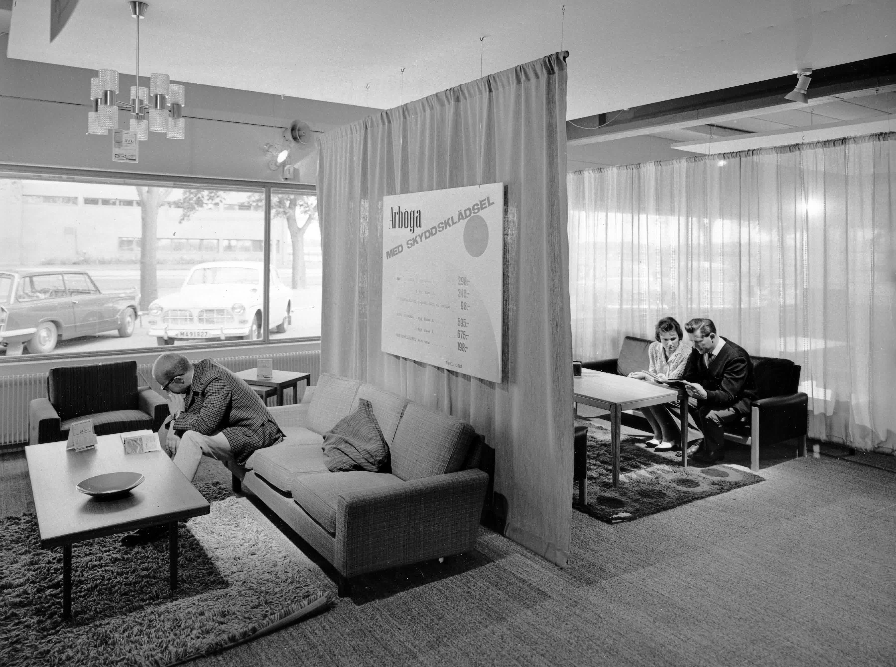 Ikea Kungens kurva interiör